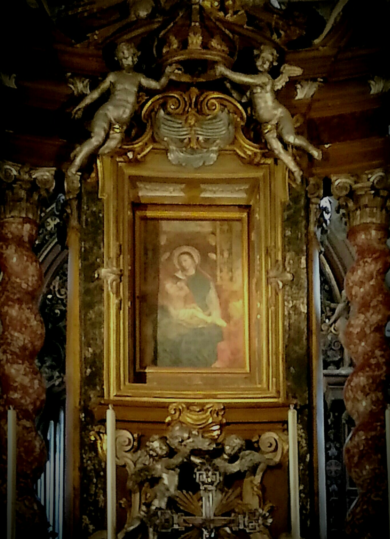 Basilica di Santa Maria della Steccata